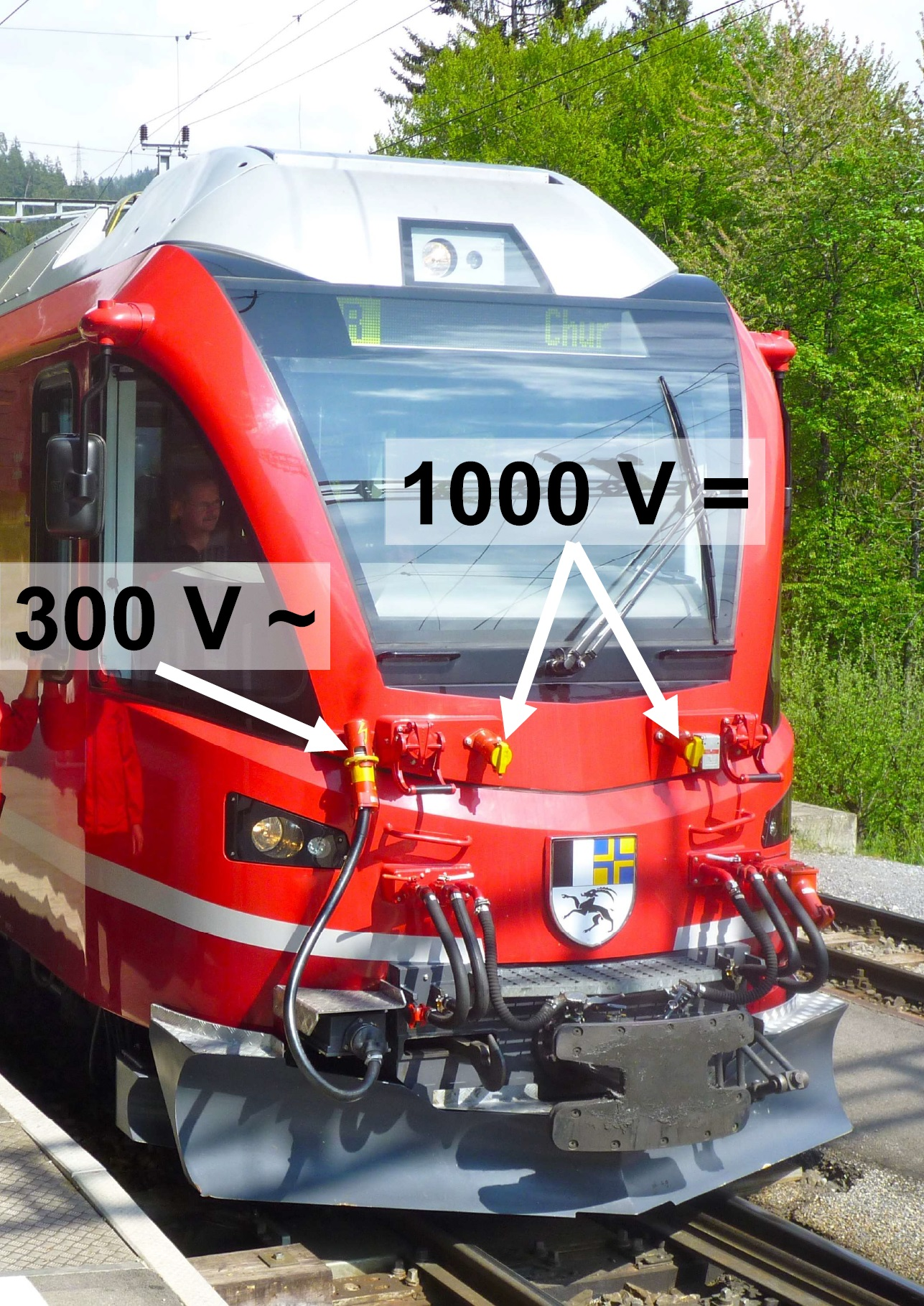 Stecker der Heizleitungen für Stammnetz (300 V 16,7 Hz) und Berninastrecke (1000 V Gleichstrom) an einem ABe 8/12 der Rhätischen Bahn.